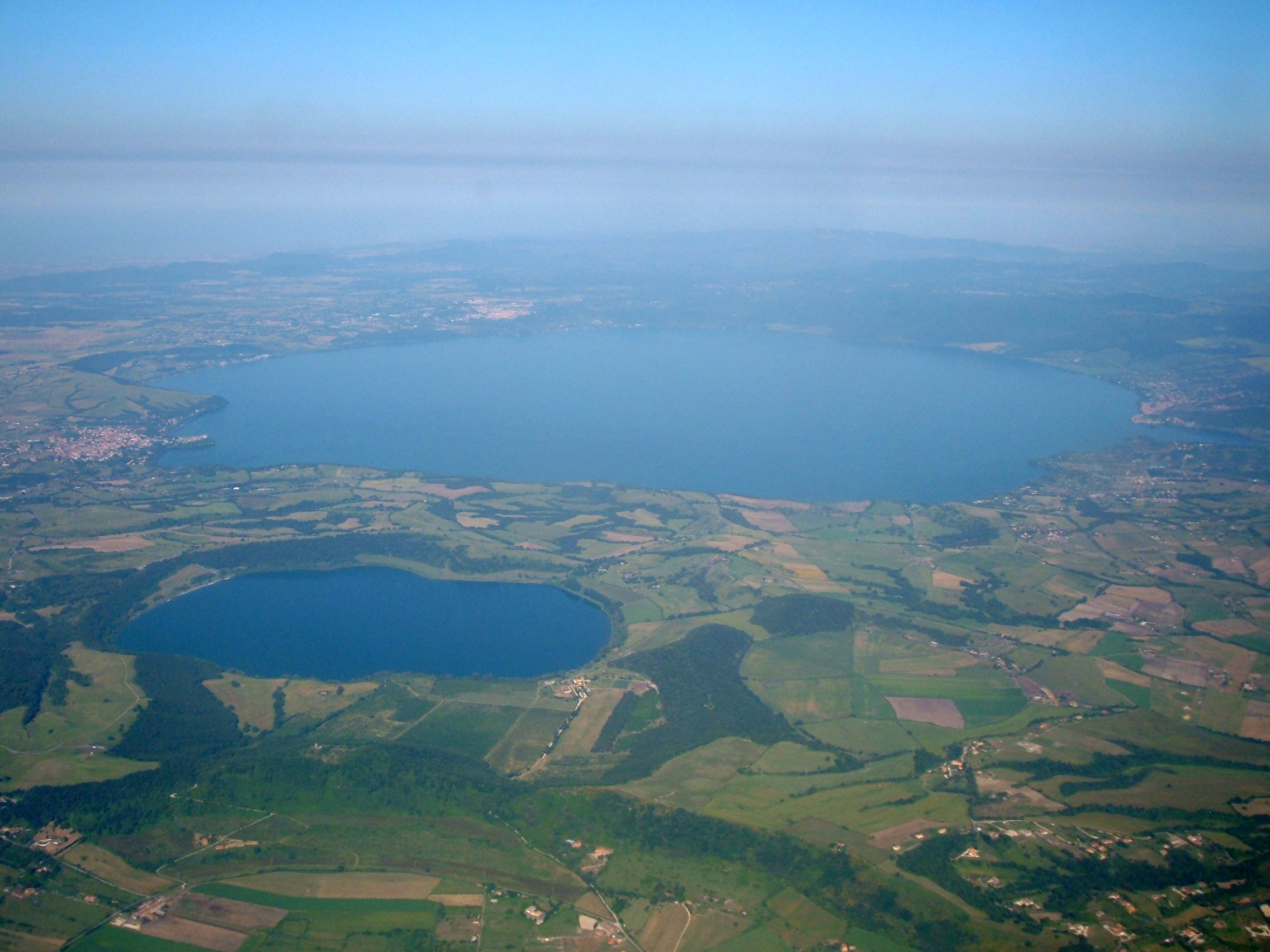 I laghi laziali di Martignano (sx) e Bracciano (dx).